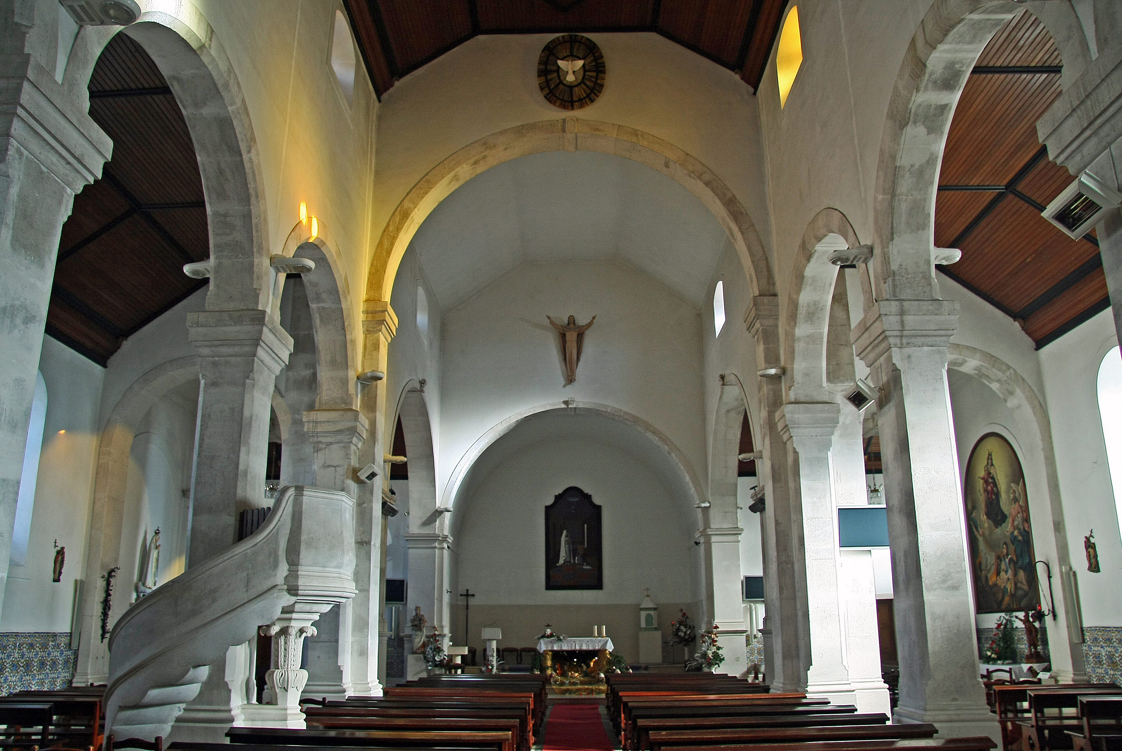 Aí, os videntes foram baptizados e fizeram a sua inserção na comunidade cristã. À entrada, do lado esquerdo da porta principal, encontra-se a Pia Baptismal onde os três pastorinhos Lúcia, Francisco e Jacinta foram baptizados.